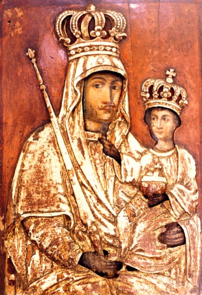 "Богоматерь Белыничская" XVIII век, холст, масло, дерево, резьба, позолота